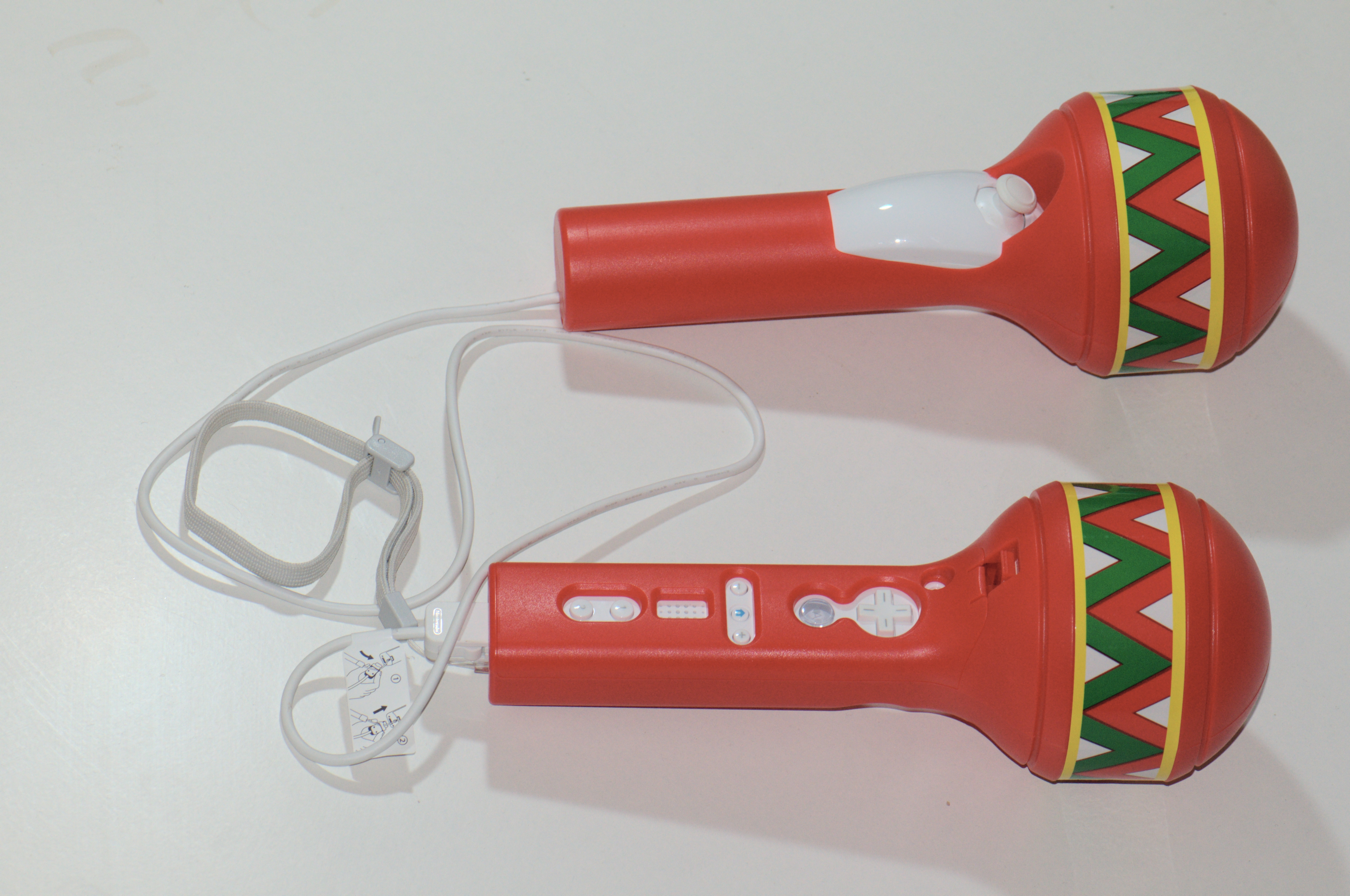 Manettes spécial pour le jeu samba de amigo.